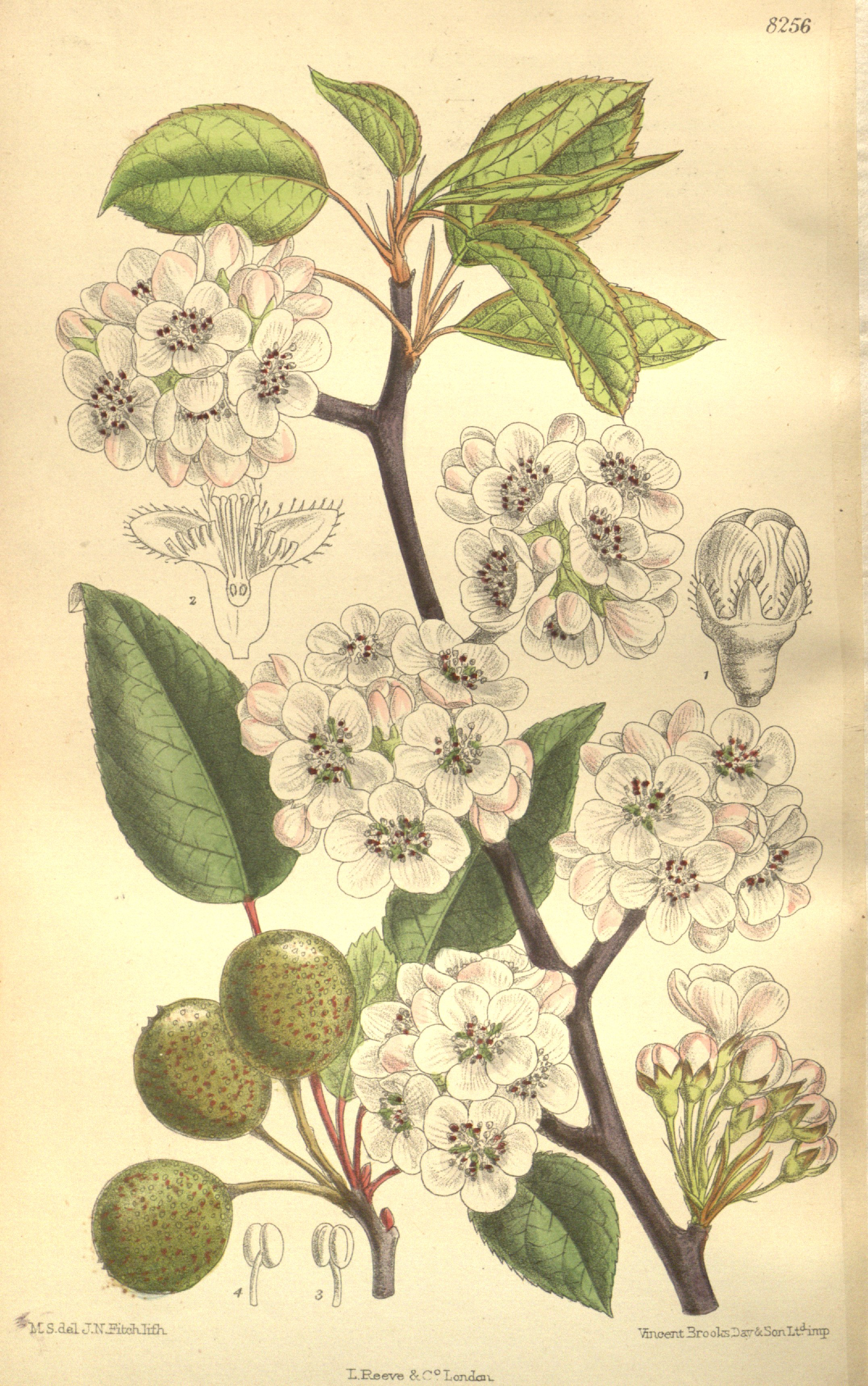 Pyrus pashia var. kumaoni, Rosaceae